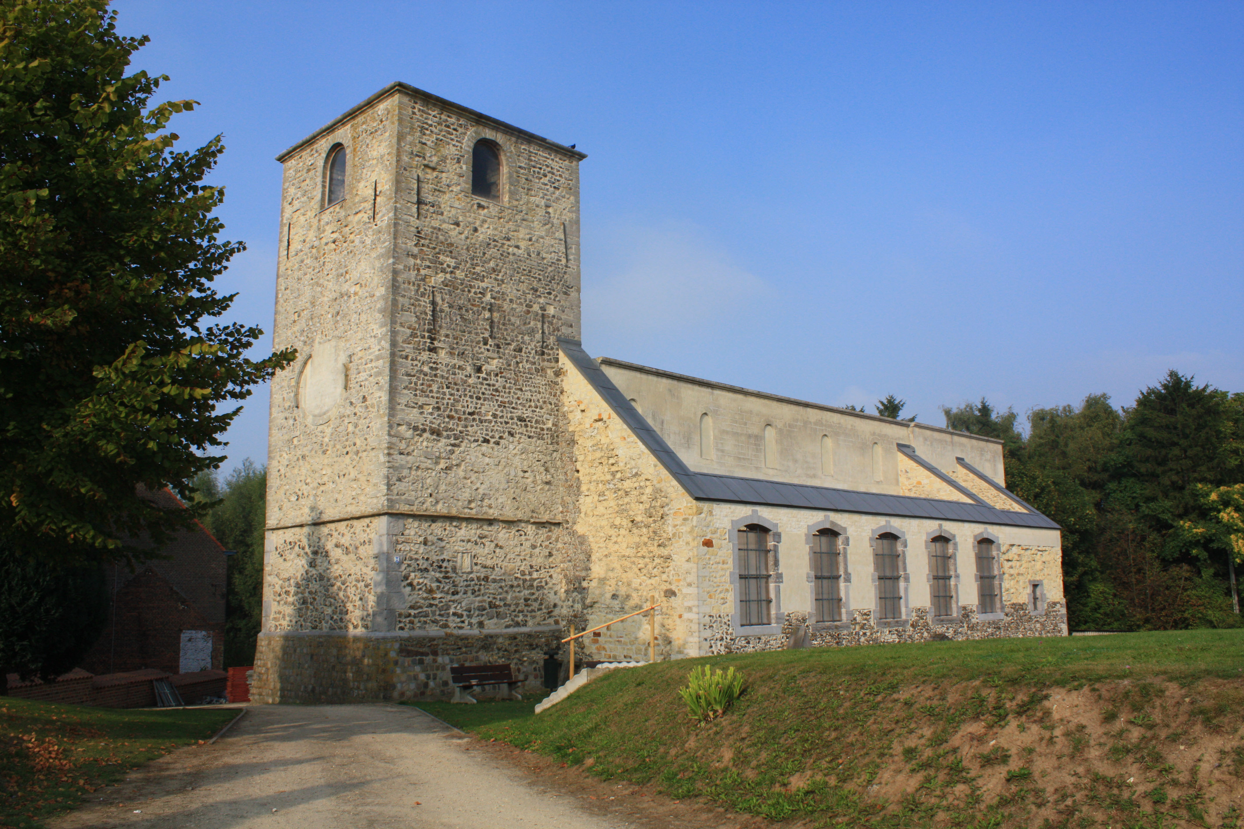 Ruïne van de kerk van Saint-Pierre te Lincent